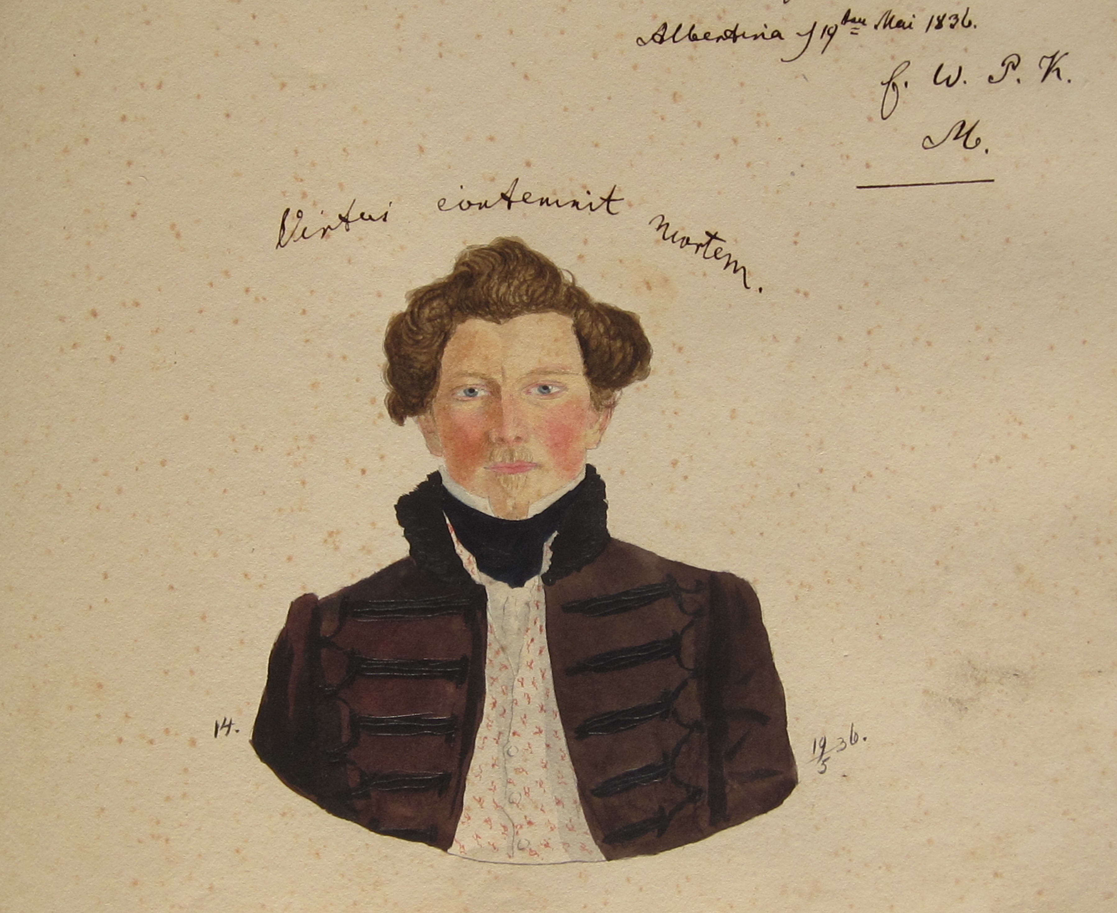 Aquarellporträt von Friedrich Wilhelm Philipp Kellermann (1813-1855) als Theologiestudent in Königsberg